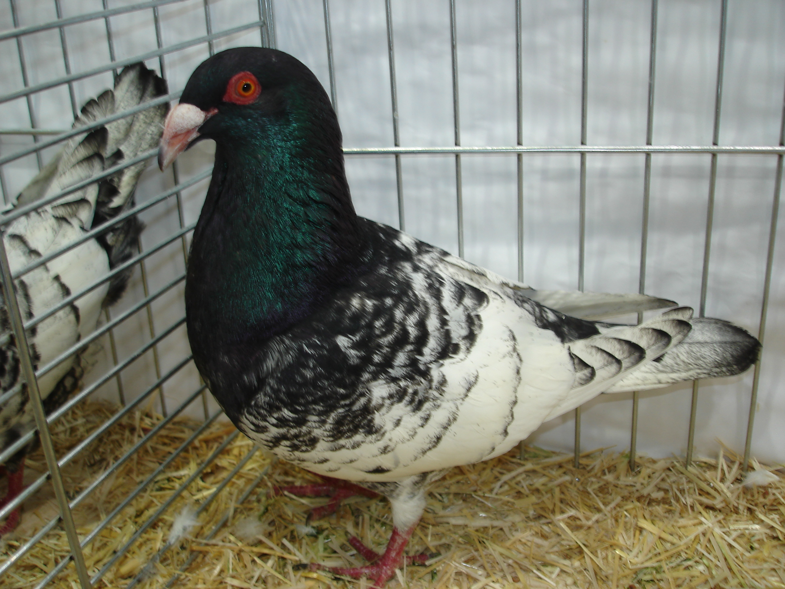 Zdjęcie gołębia rasy - hiszpan